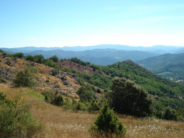 La Corniche des Cevennes